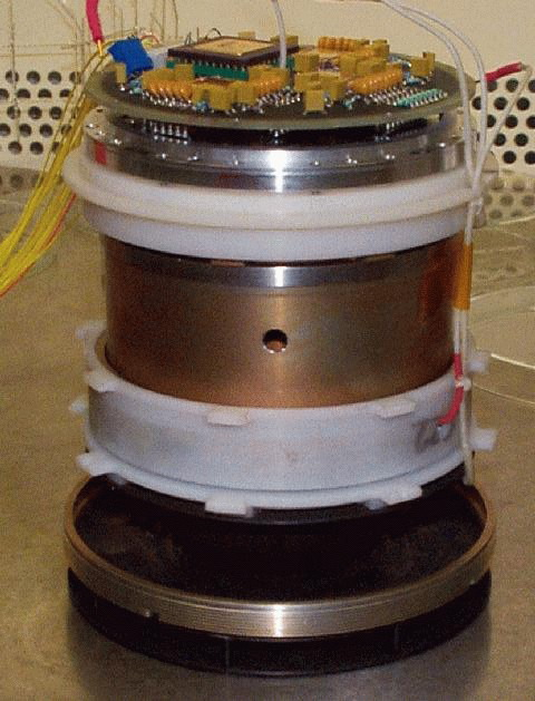 Teil des ASPERA-3, vom "Swedish Institute of Space Physics"